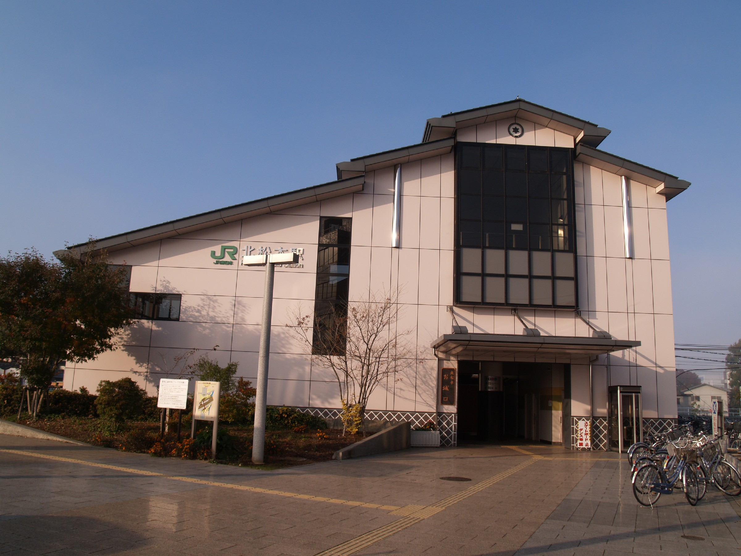 北松本駅お城口